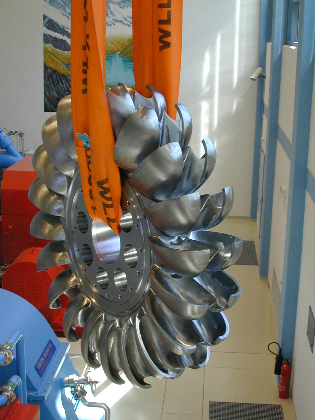 Peltonturbine des Kartell-Kraftwerkes in St. Anton am Arlberg. Das Triebwasser dieses Kraftwerkes wird in den Verwallsee geleitet und kann so ein zweites mal abgearbeitet werden.